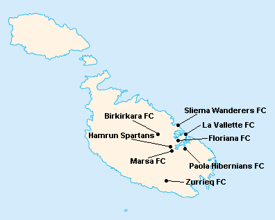 Répartition des clubs en Premier League Maltaise 1980-1981.